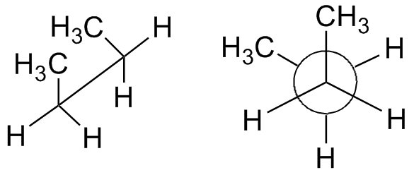 gauche-Butane